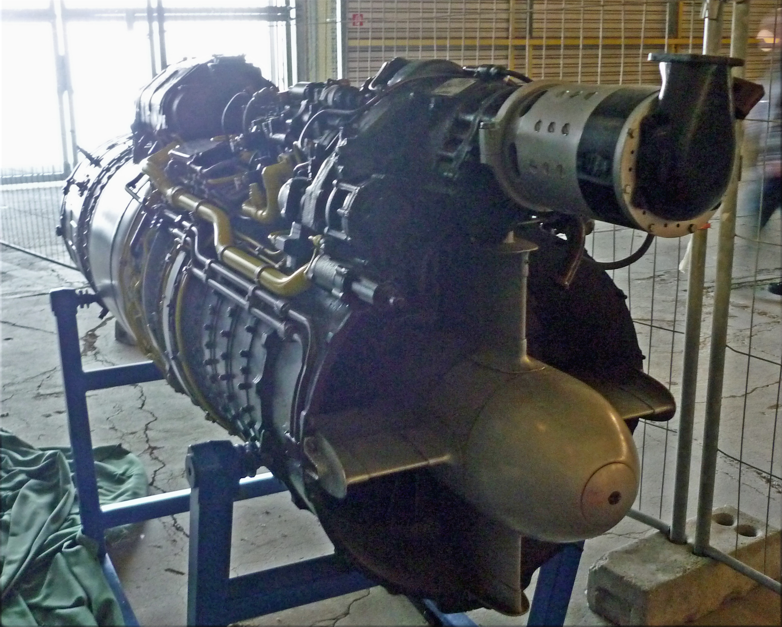 Das Strahltriebwerk Mikulin-RD-9B der "152" auf dem Flughafen in Dresden-Klotzsche